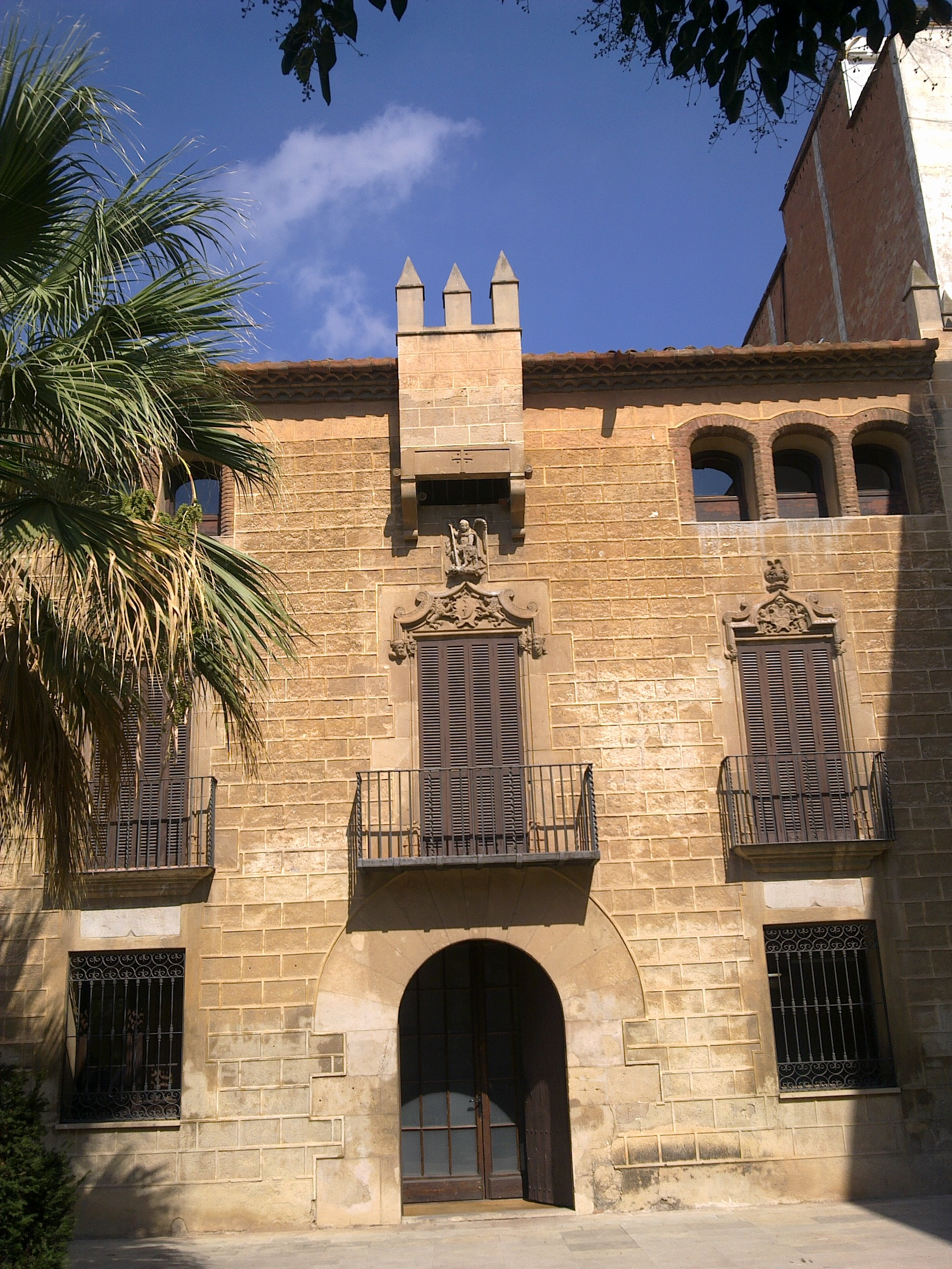 Gòtic tardà segles XVI-XVIII, museu d'història de l'Hospitalet de Llobregat